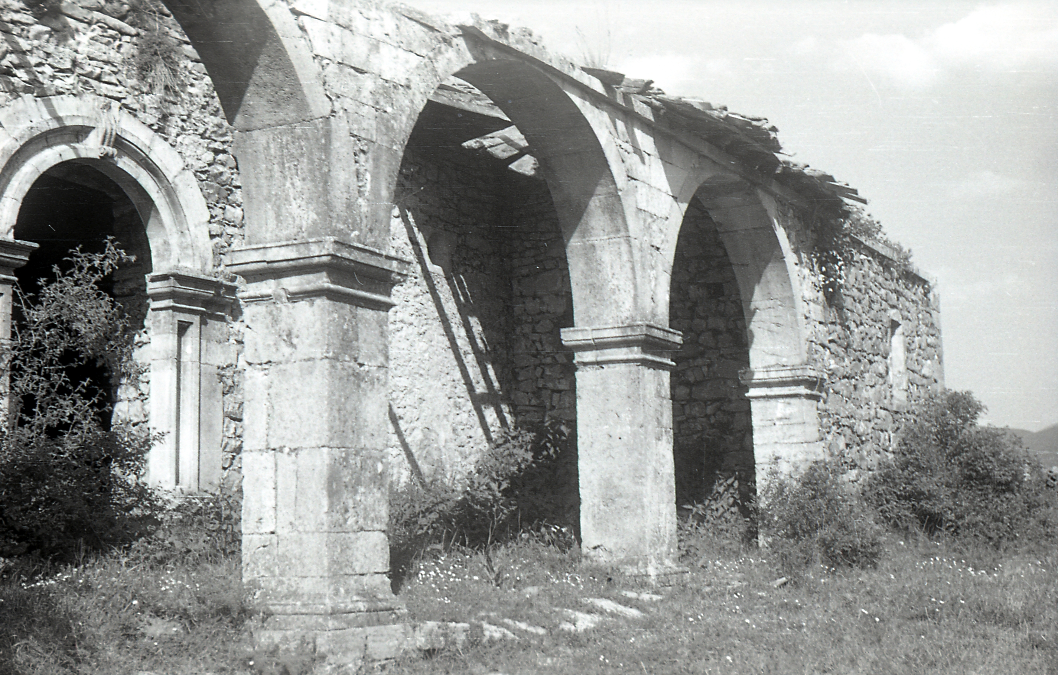 Fotografía de la iglesia en honor a San Adriano en Oville derruida después de la guerra civil española y antes de su reconstrucción de 1.982.